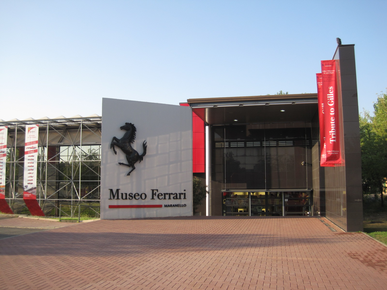 Galleria Ferrari